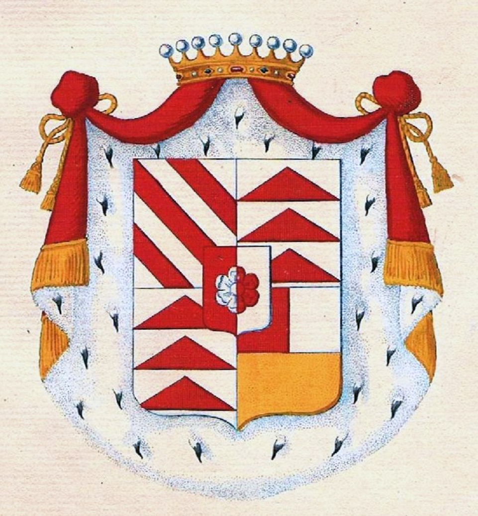 Wappen der Grafen von Trauttmannsdorff, altkolorierter Wappen-Kupferstich in Fürstenkolorit